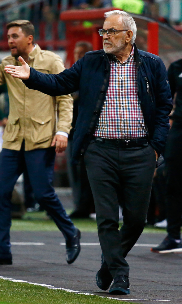 «Локомотив» - «Амкар»